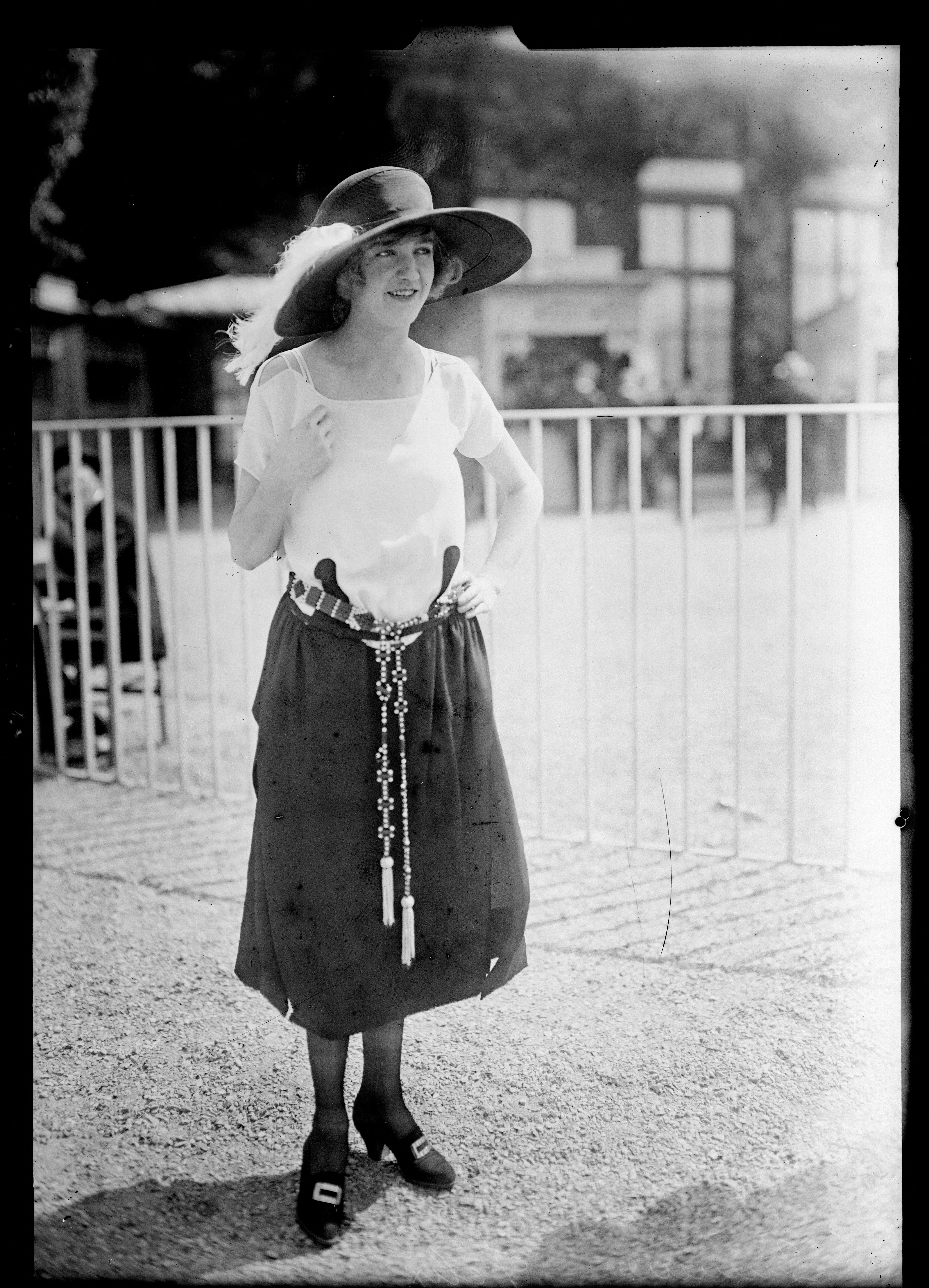 Geneviève Félix, actrice.